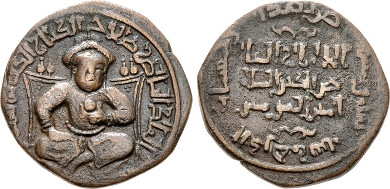 Dirrã de Saladino cunhado em Maiafariquim em 1215-1216